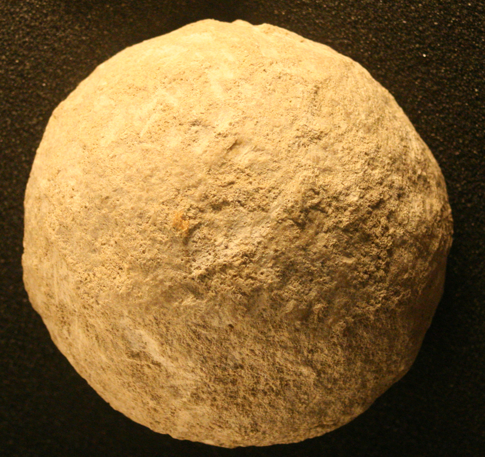 bola de Sidi Abderrahman dans une vitrine du Musée de l'Homme, Paris